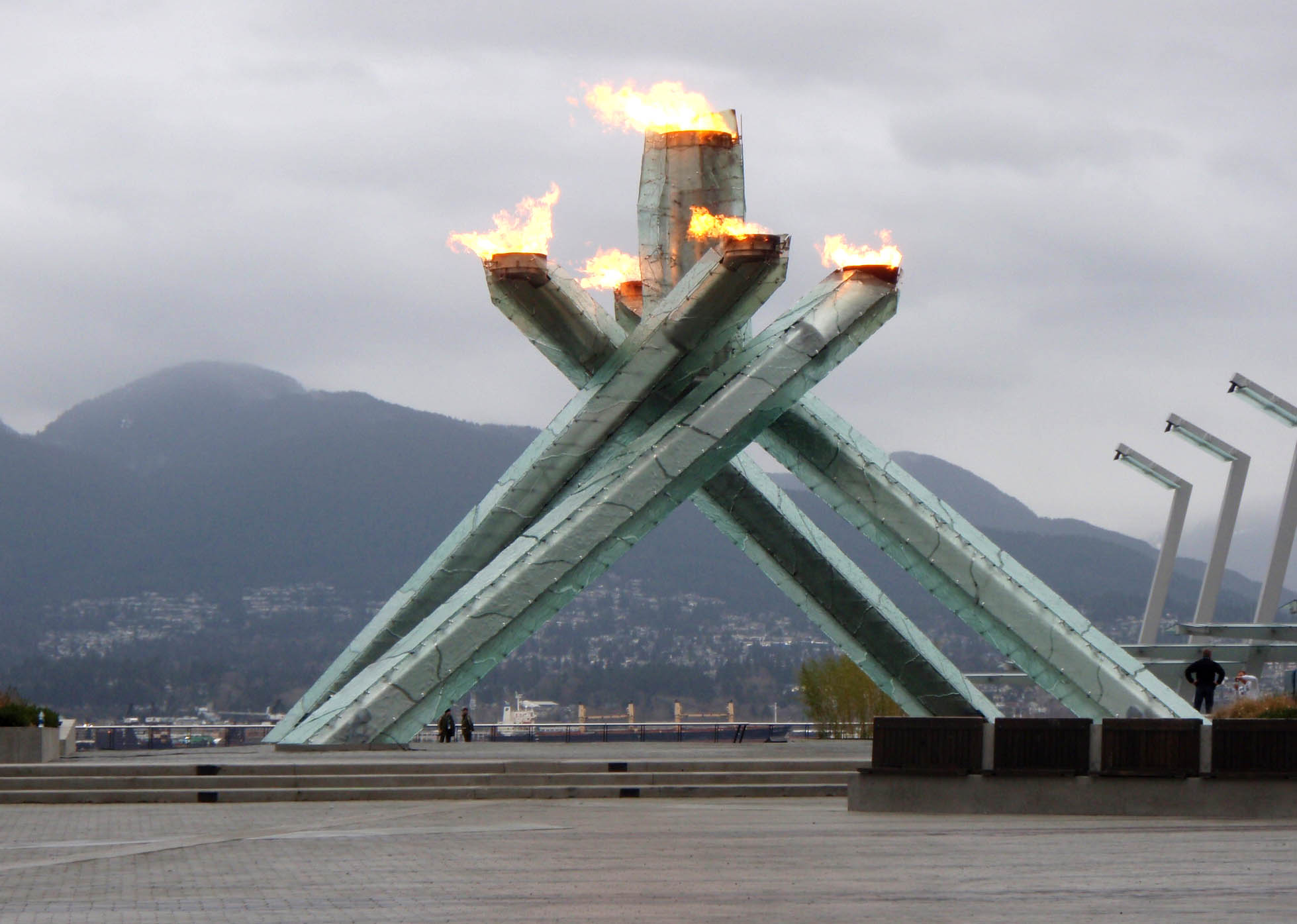 Cauldron at Convention Centre